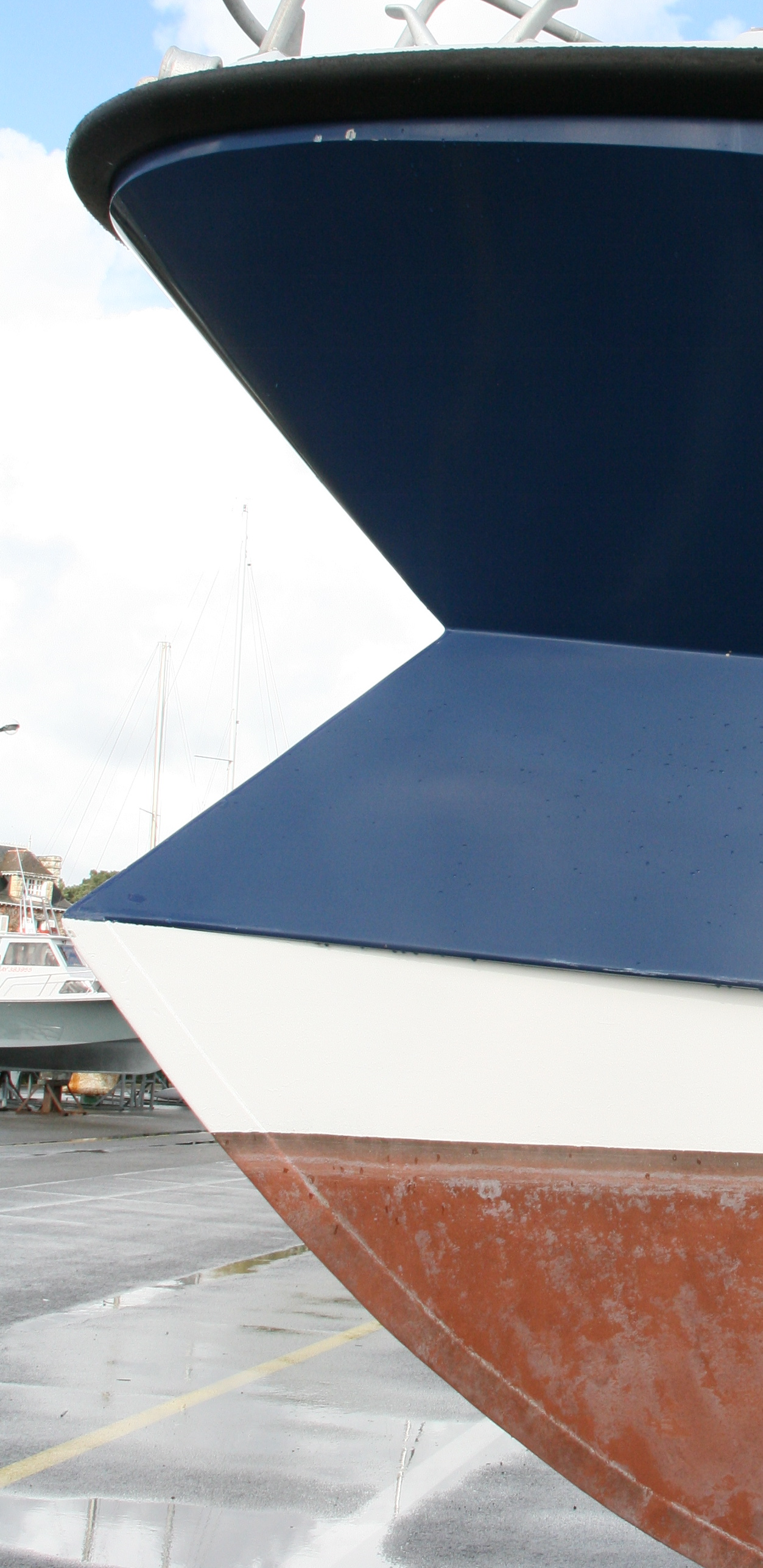 étrave polyédrique d'une vedette de sauvetage